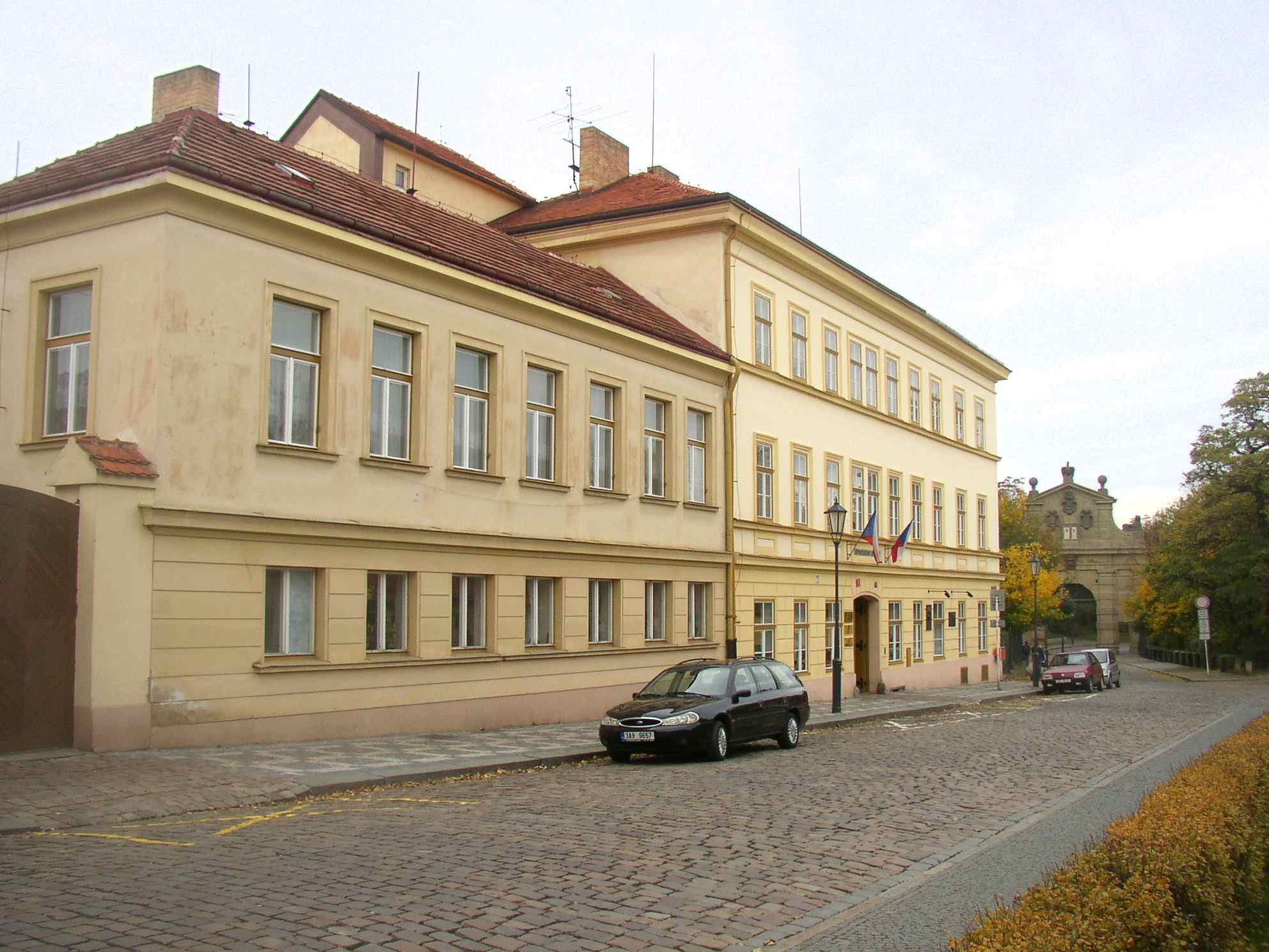 Jedlička's Institute and School for Disabled Children, established 1912, in Vyšehrad, Prague, Czech Republic. Jedličkův ústav a škola pro tělesně postižené děti na pražském Vyšehradě. Zřízen MUDr. Rudolfem Jedličkou roku 1912. Photo taken by Miaow Miaow in October 2005, PD-self